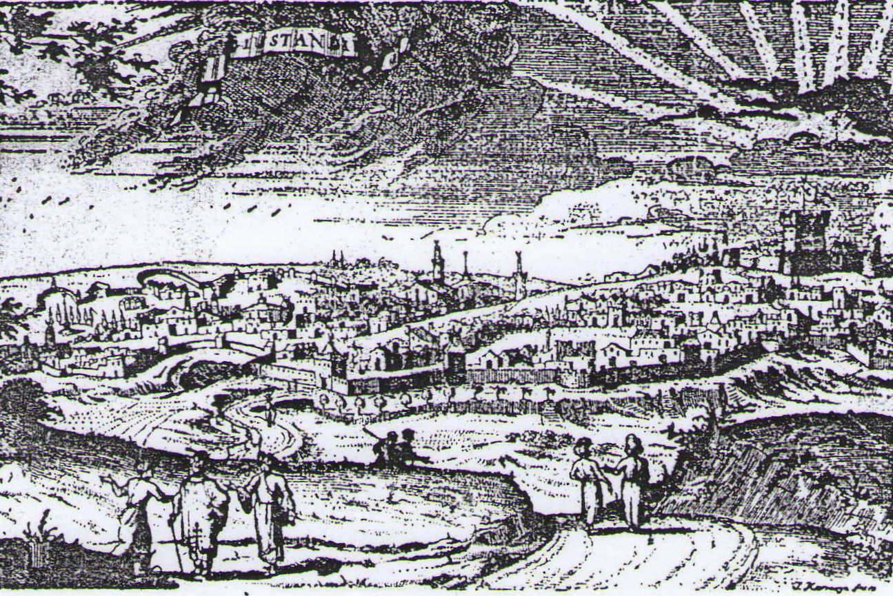 Кюстендил, 1690 г., гравюра върху мед. Я.Хоревайн